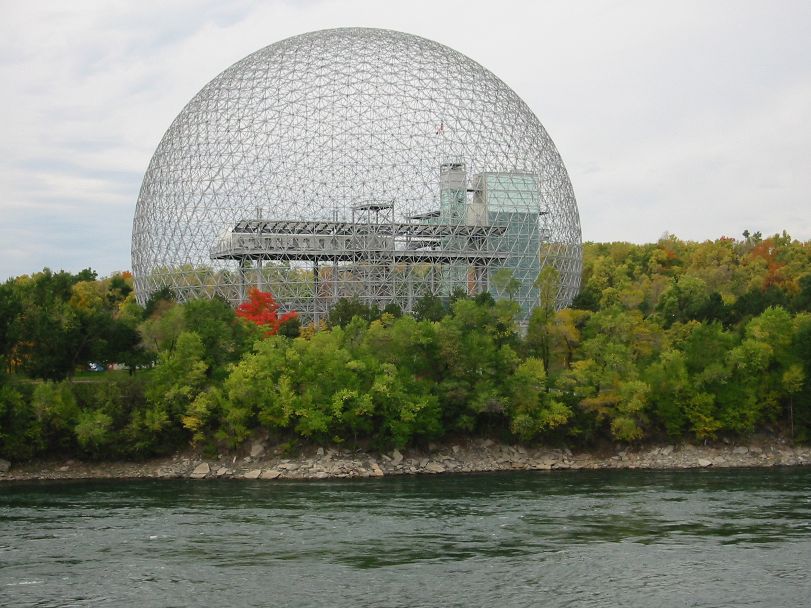 Terre des Hommes, Île Sainte-Hélène, Montréal, Québec, Canada.